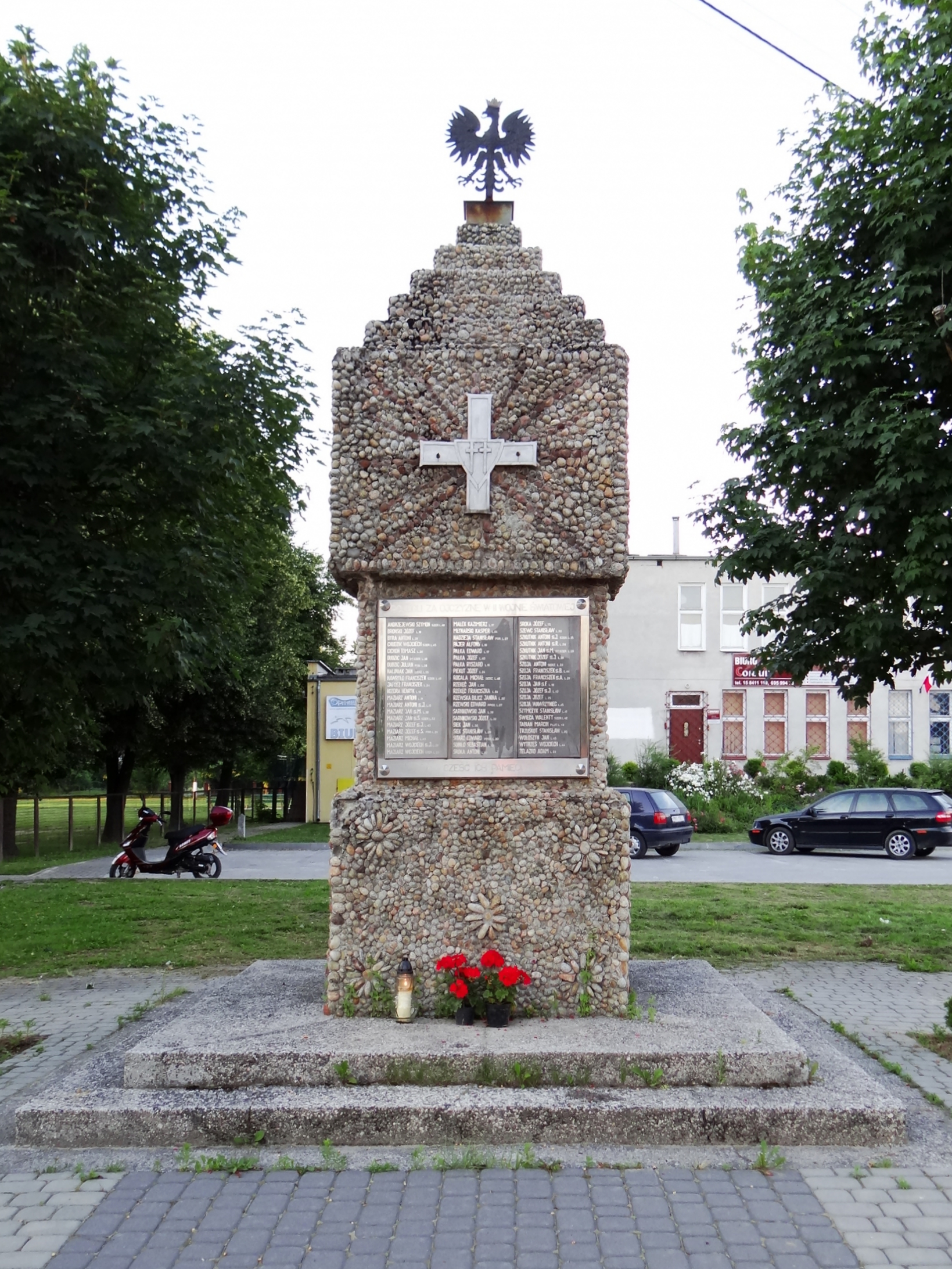 Zdjęcie wykonane w miejscowości Zarzecze, powiat niżański.